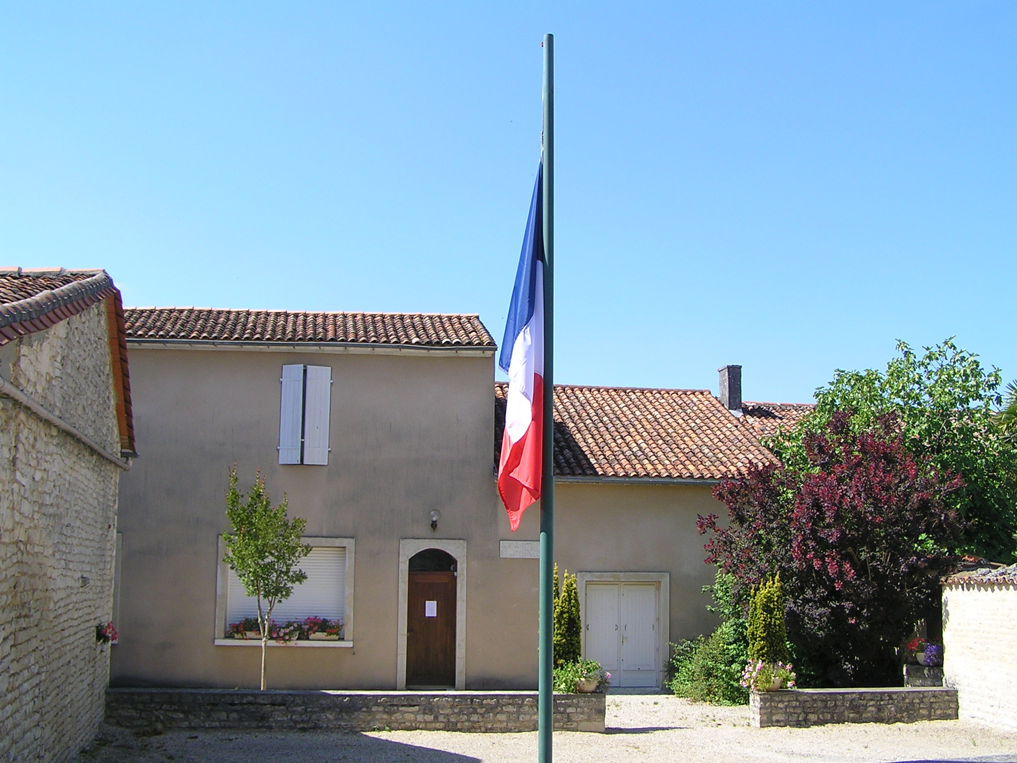 mairie de Plaizac